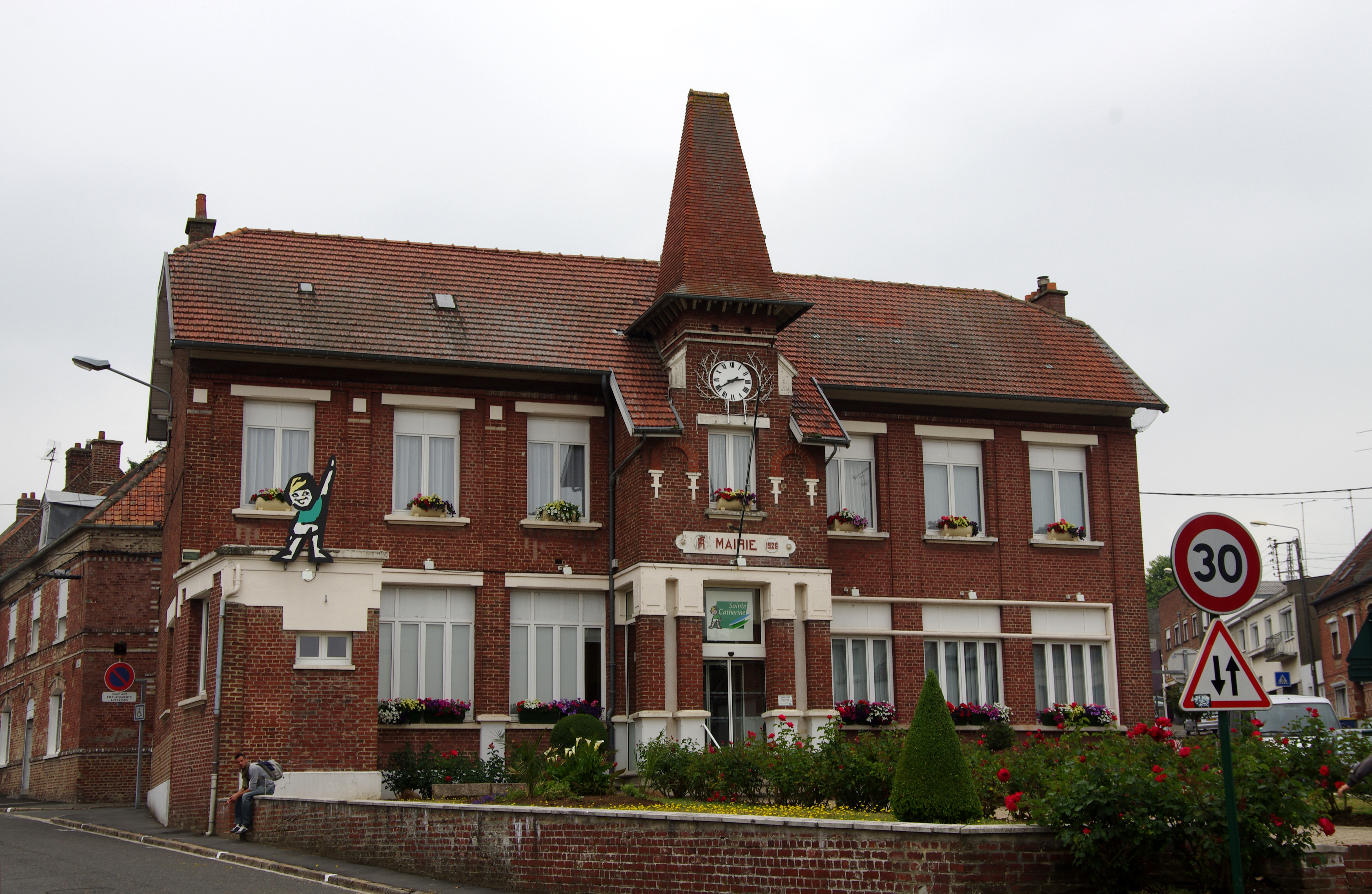 Sainte-Catherine-lès-Arras (Pas-de-Calais, France) - La mairie. .